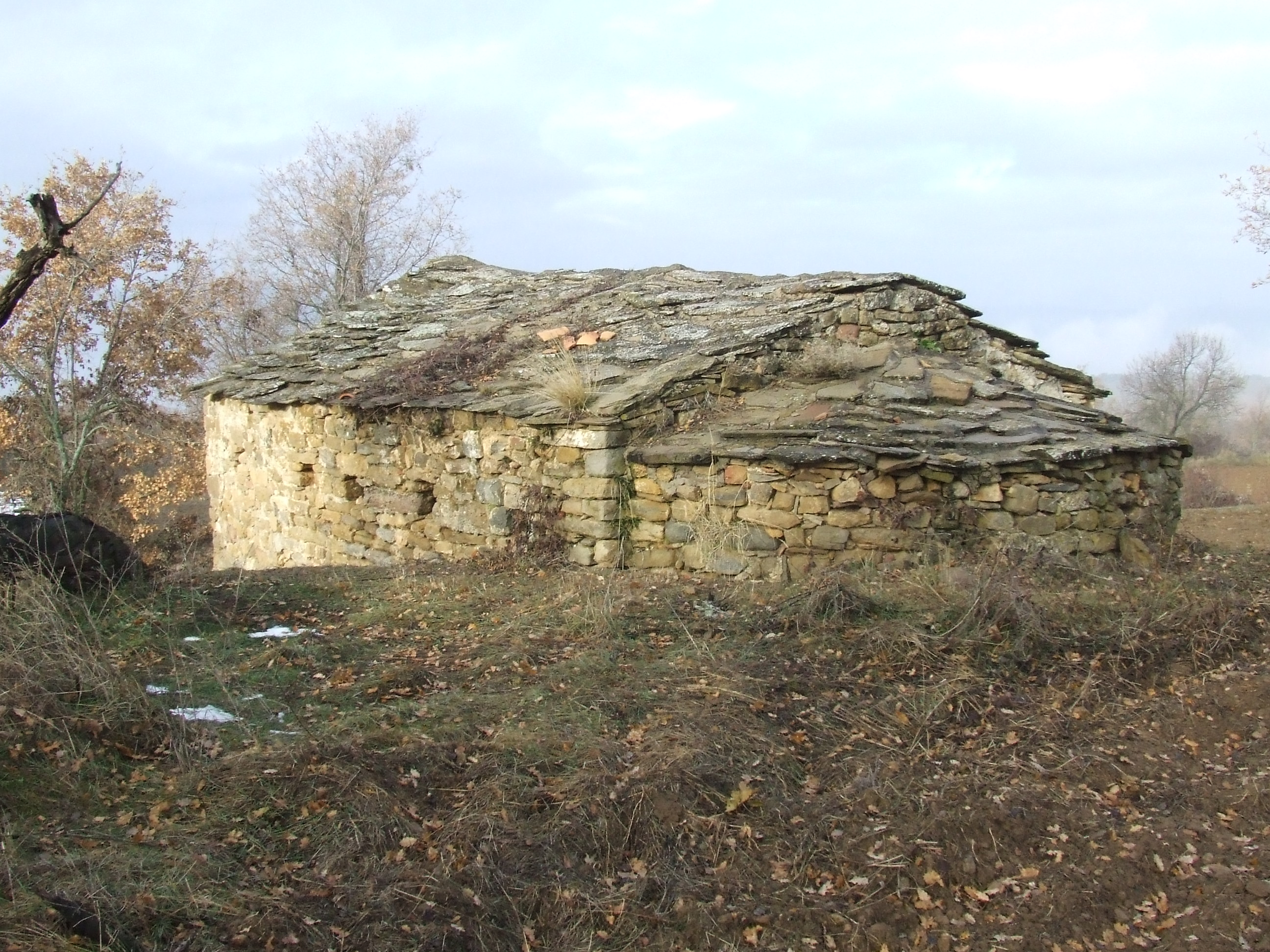 Façana sud de Sant Fruitós d'Aransís (Gavet de la Conca, Pallars Jussà)